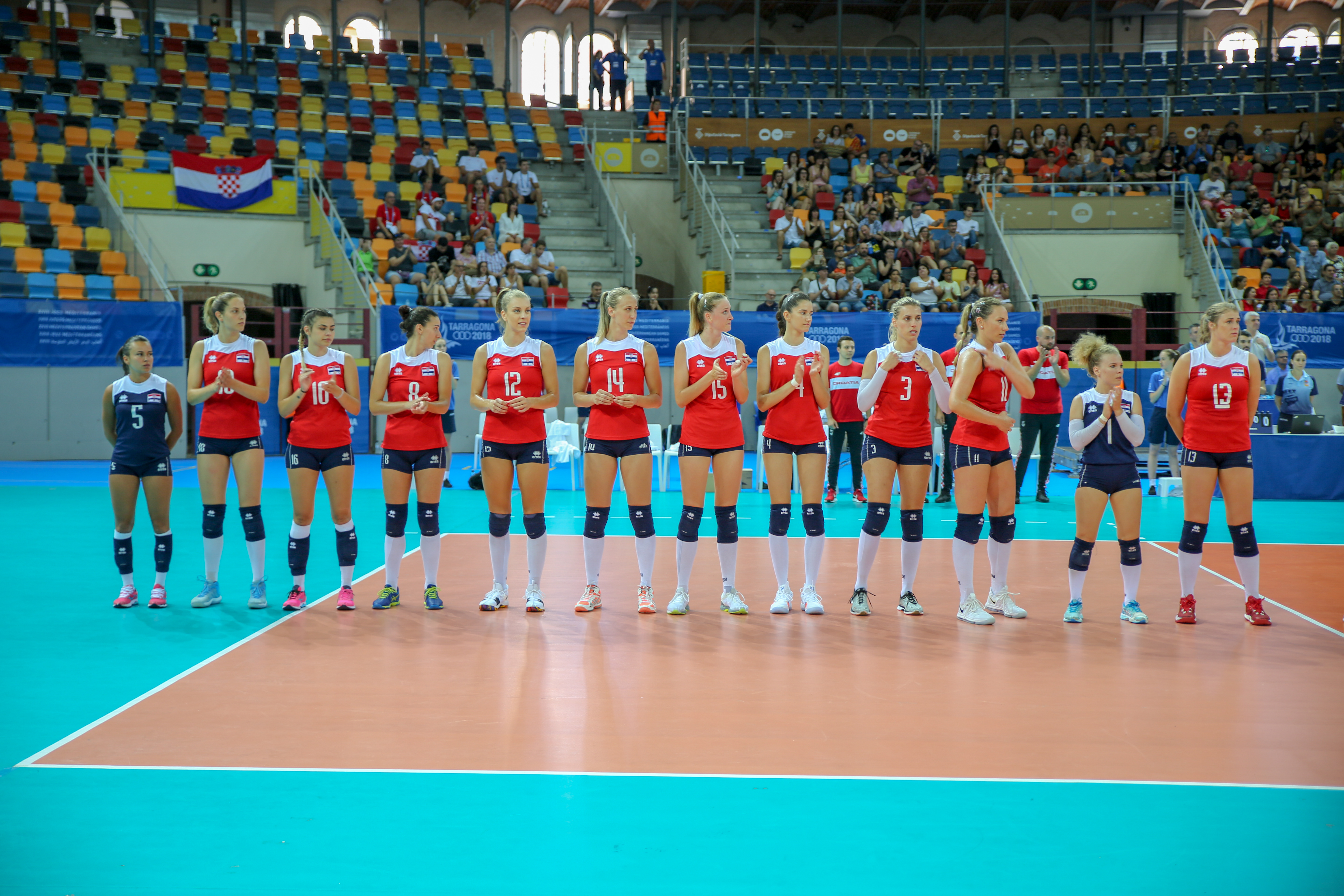 Croacia - Final Juegos del Mediterráneo Voleibol Femenino